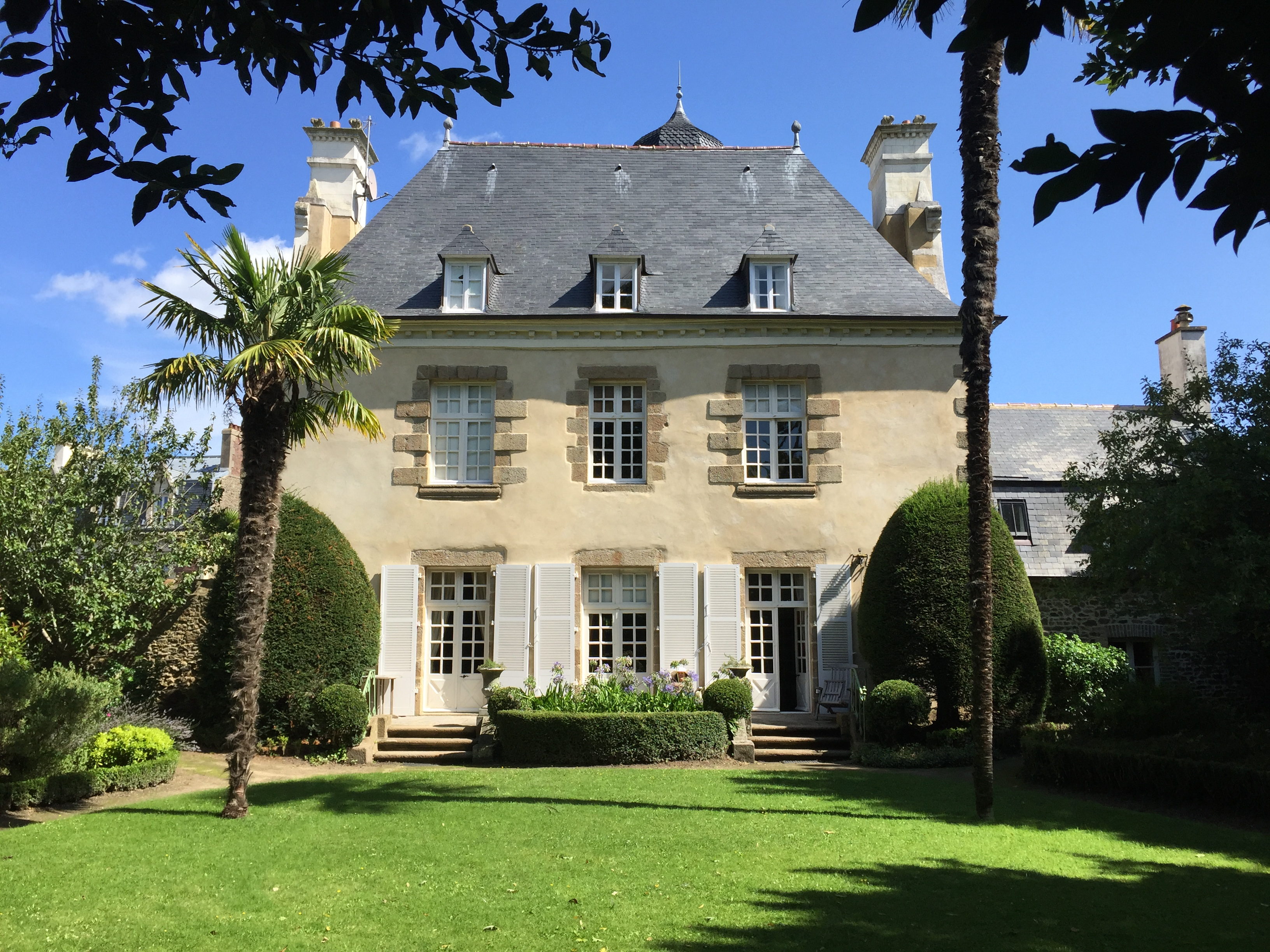 Photographie de la Verderie, vue du jardin, à Saint-Servan